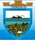 Livre